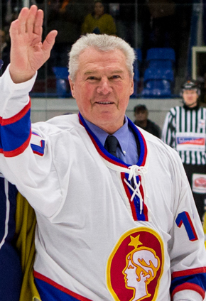 1. liga - 13.12.2014 16:00 CET - Round 34 Rytíři Kladno 4:0 (2:0, 1:0, 1:0) HC Dukla Jihlava